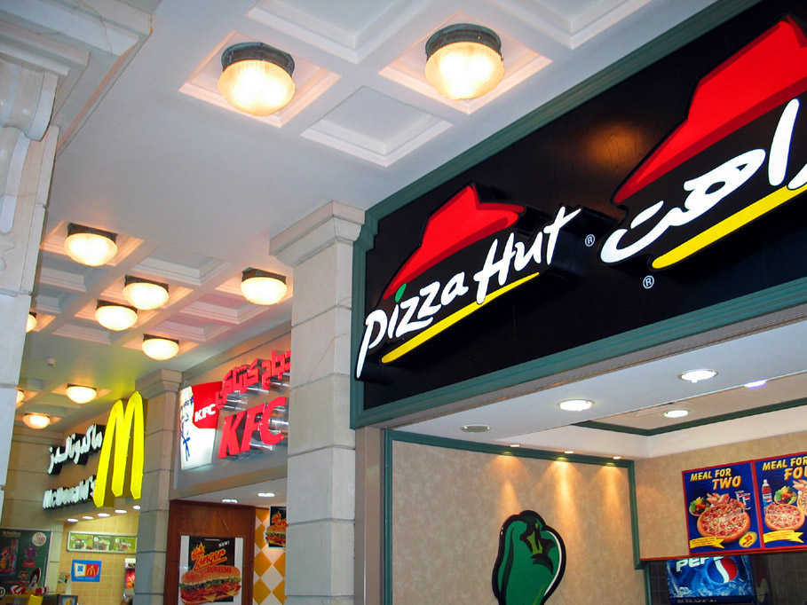 Un MacDonald's, un KFC et un Pizza Hut aux Émirats arabes unis